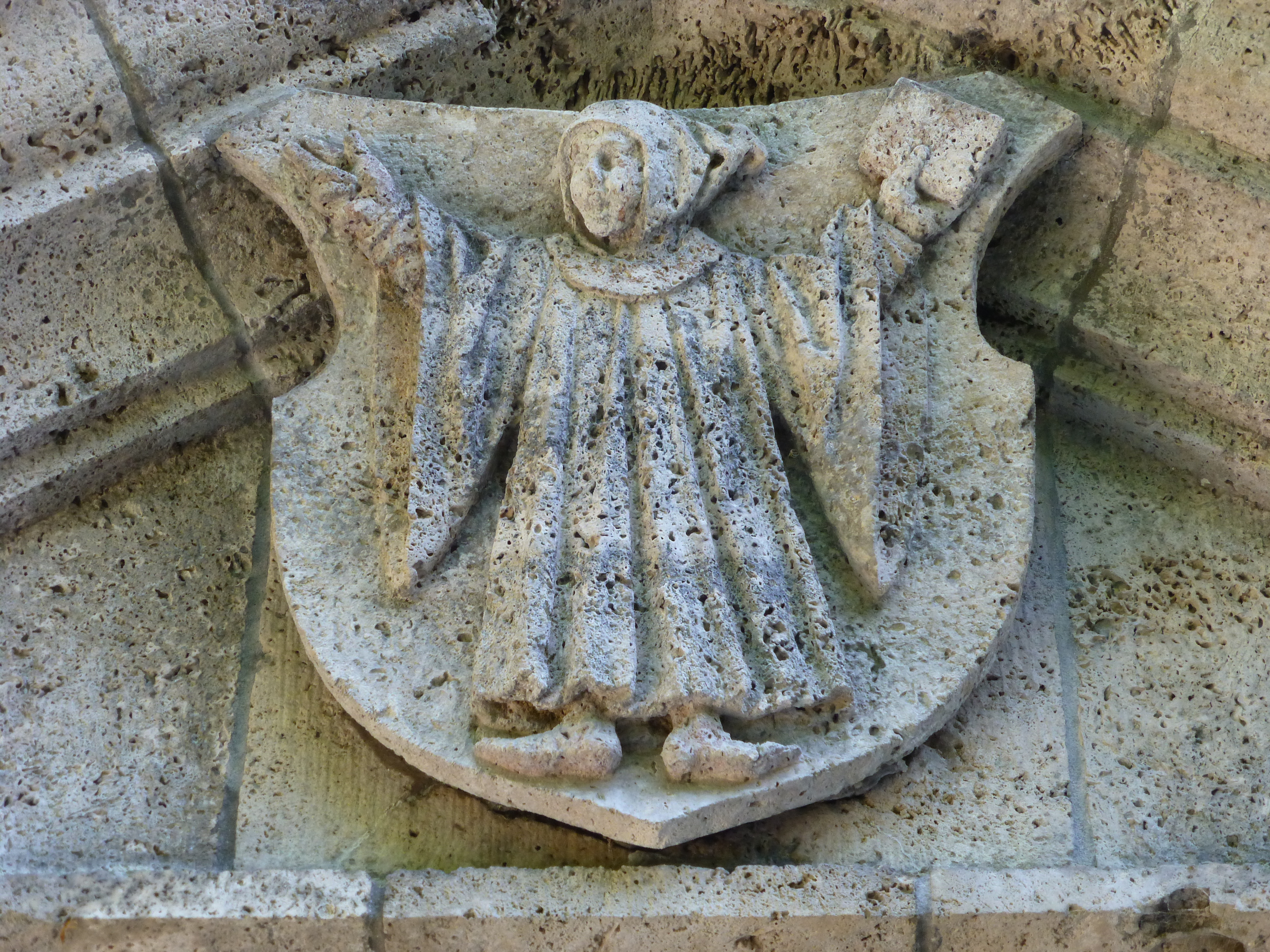 Aussichtsturm Taubenberg; Tuffsteinrelief mit dem Münchner Kindl über dem Eingangsportal des Turms